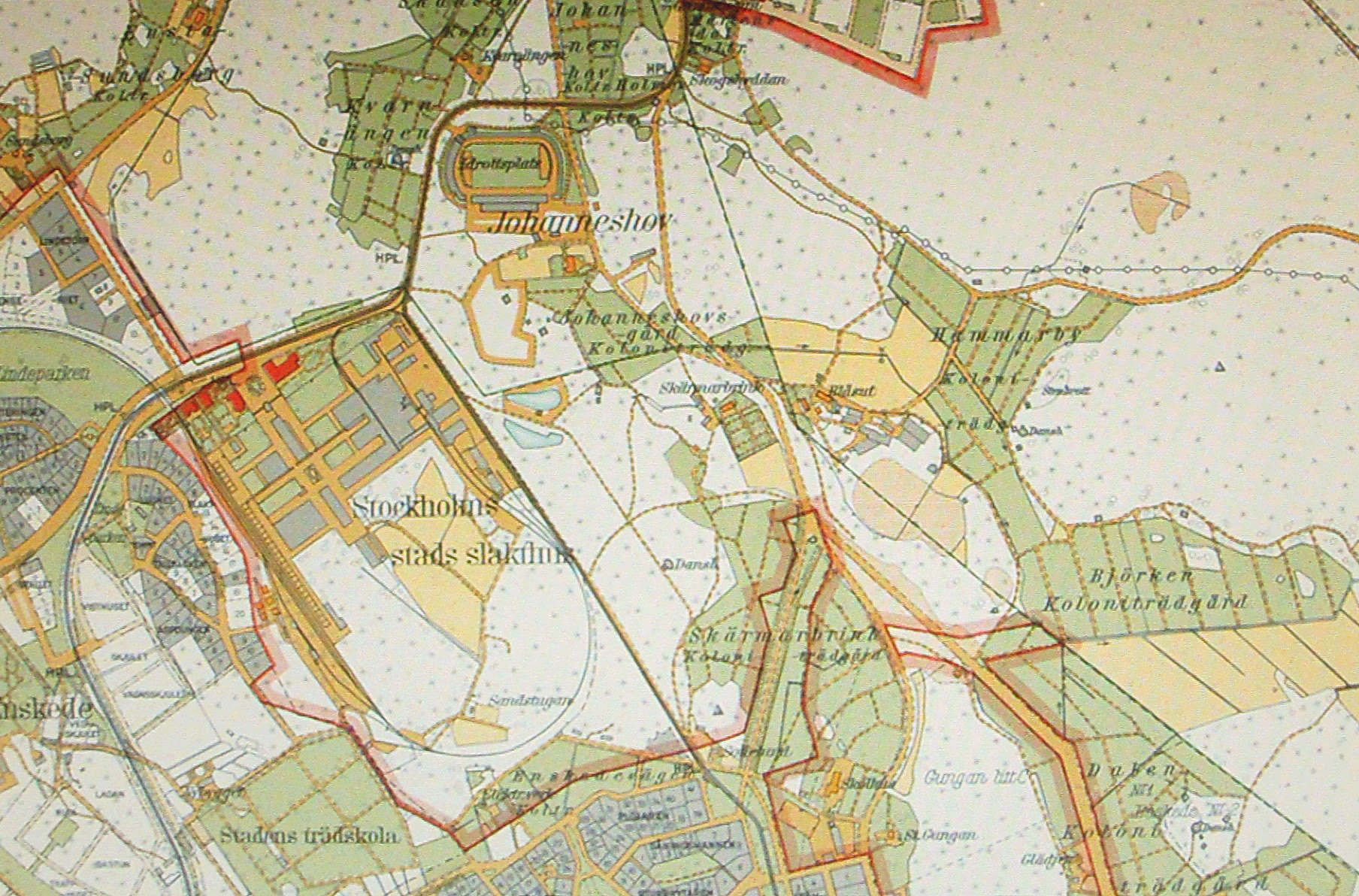 Del av "detaljerad karta över Stockholm med omnejd. Upprättad mellan 1917 och 1934" visande del av Hammarby med Johanneshovs koloniträdgård, Björken koloniträdgård, Hammarby koloniträdgård, Skärmabrink koloniträdgård och Dalen Koloniträdgård. På västra delen syns Enskede slakthus "Stockholms stads slakthus".